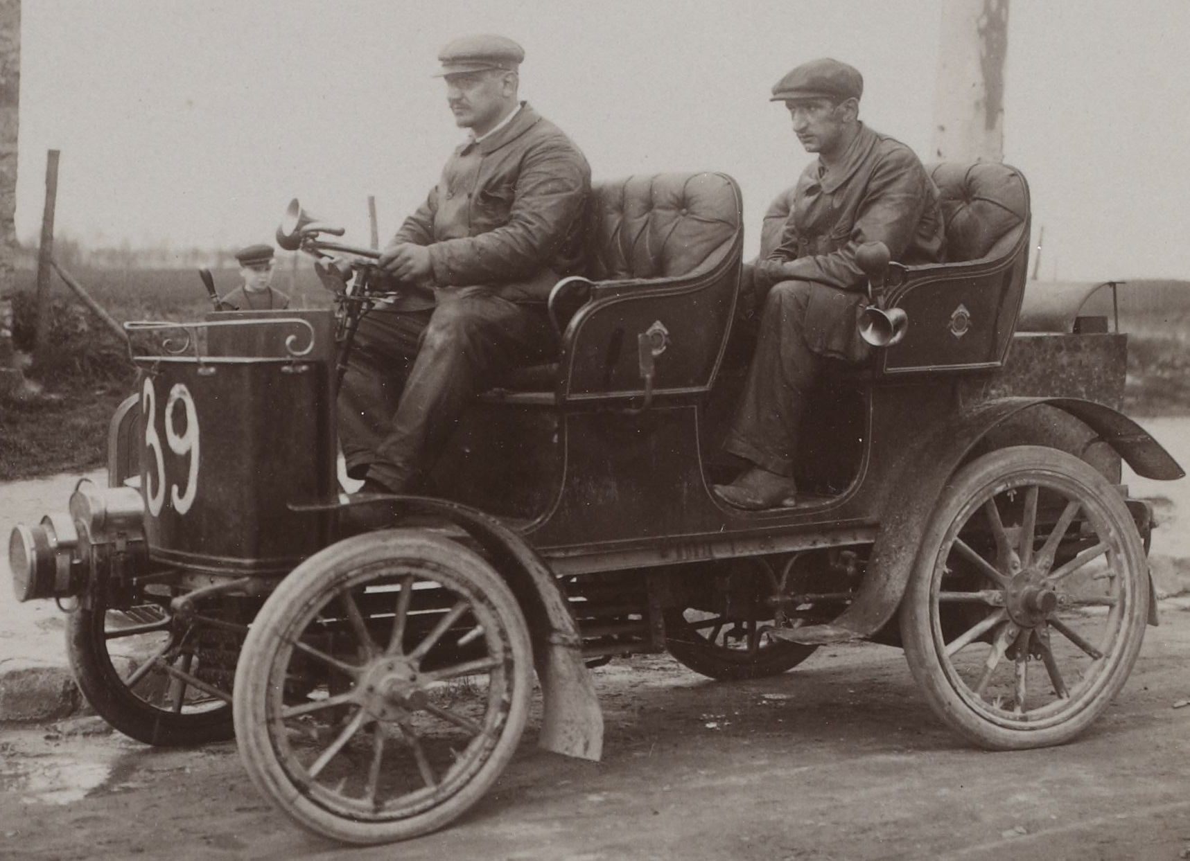 [Collection Jules Beau. Photographie sportive] : T. 15. Année 1901 / Jules Beau : F. 27. [Course du Catalogue, Melun - Nangis - Valence - Melun, 28 avril 1901]